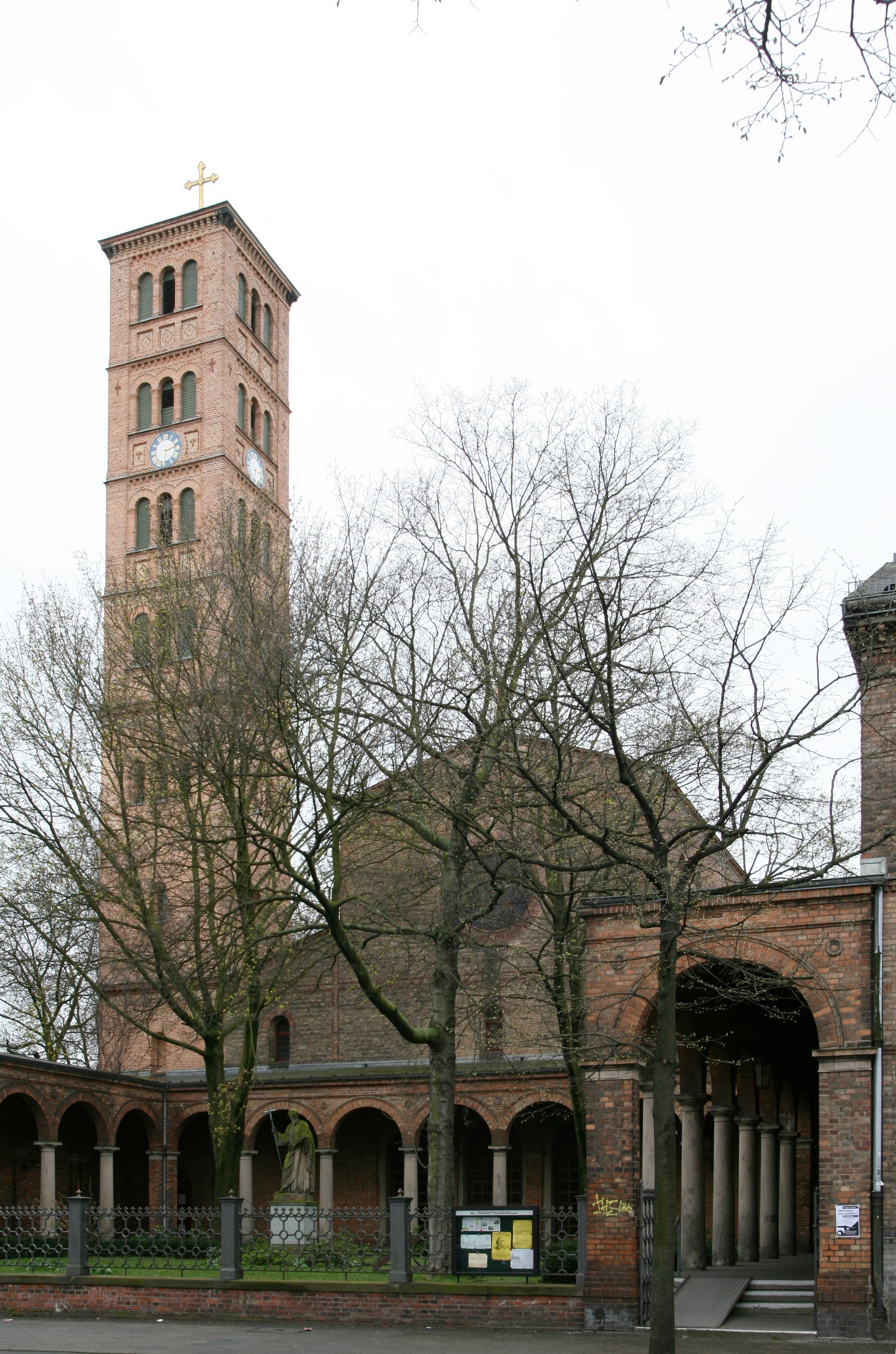 St.-Jacobi-Kirche in Berlin, Germany